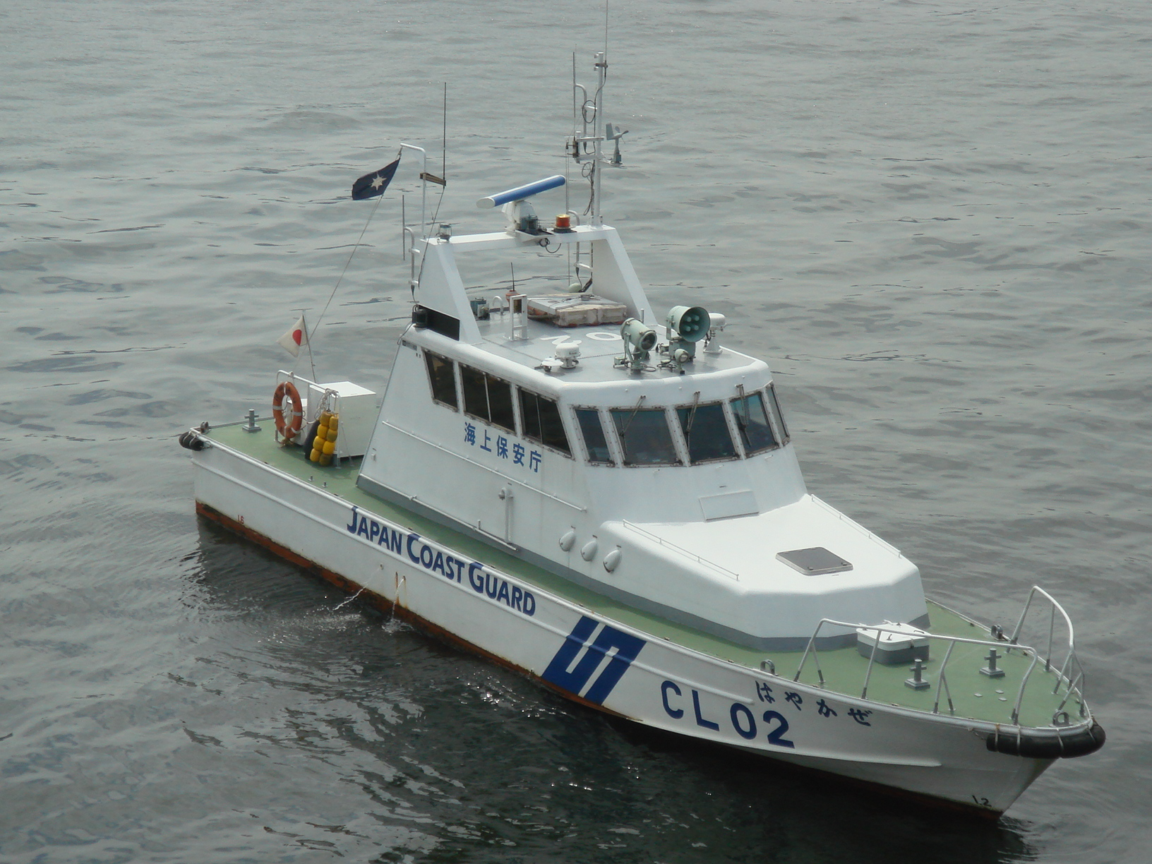 2009年9月13日 晴海埠頭より撮影